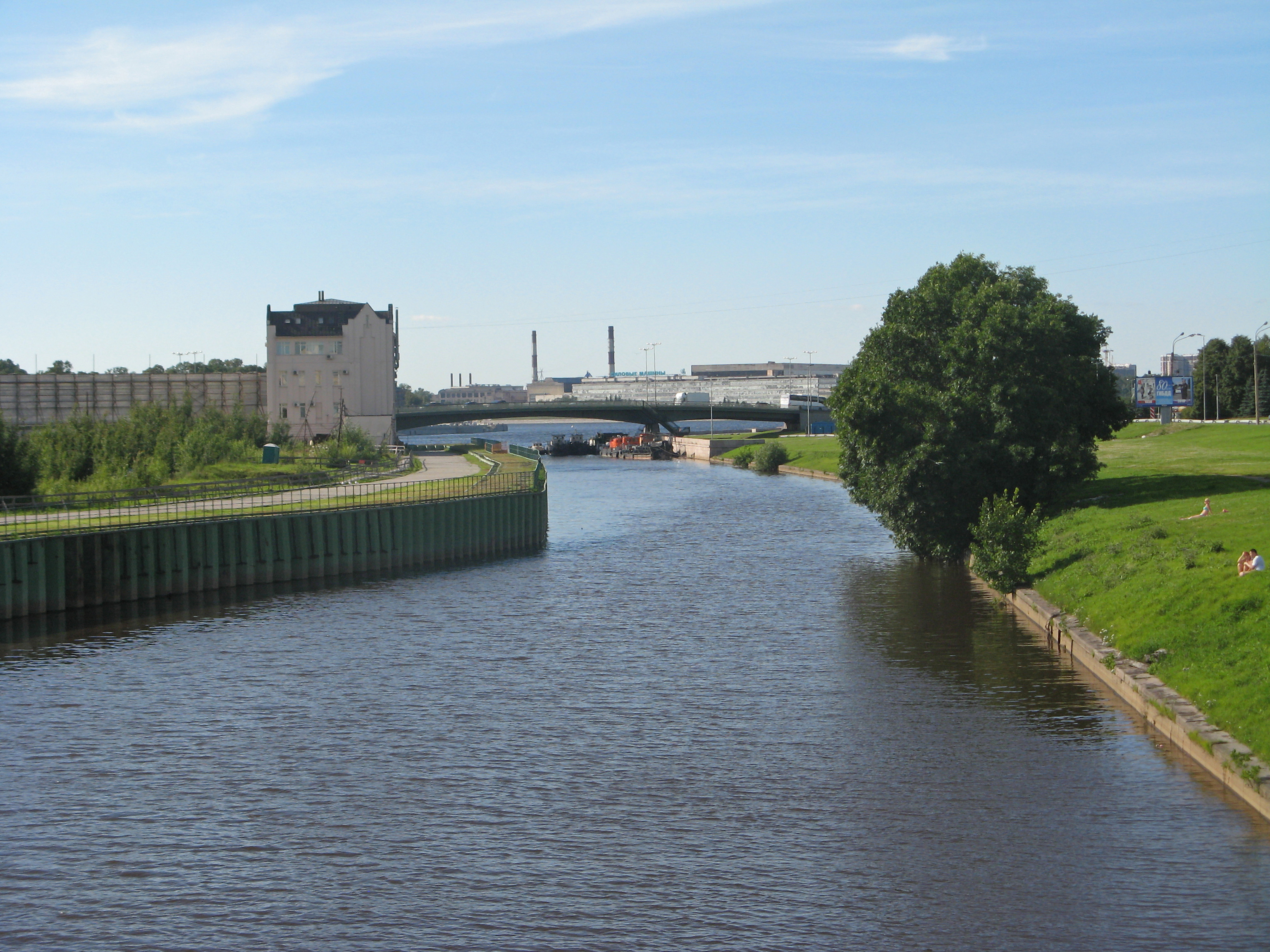 Река Охта у впадения в Неву